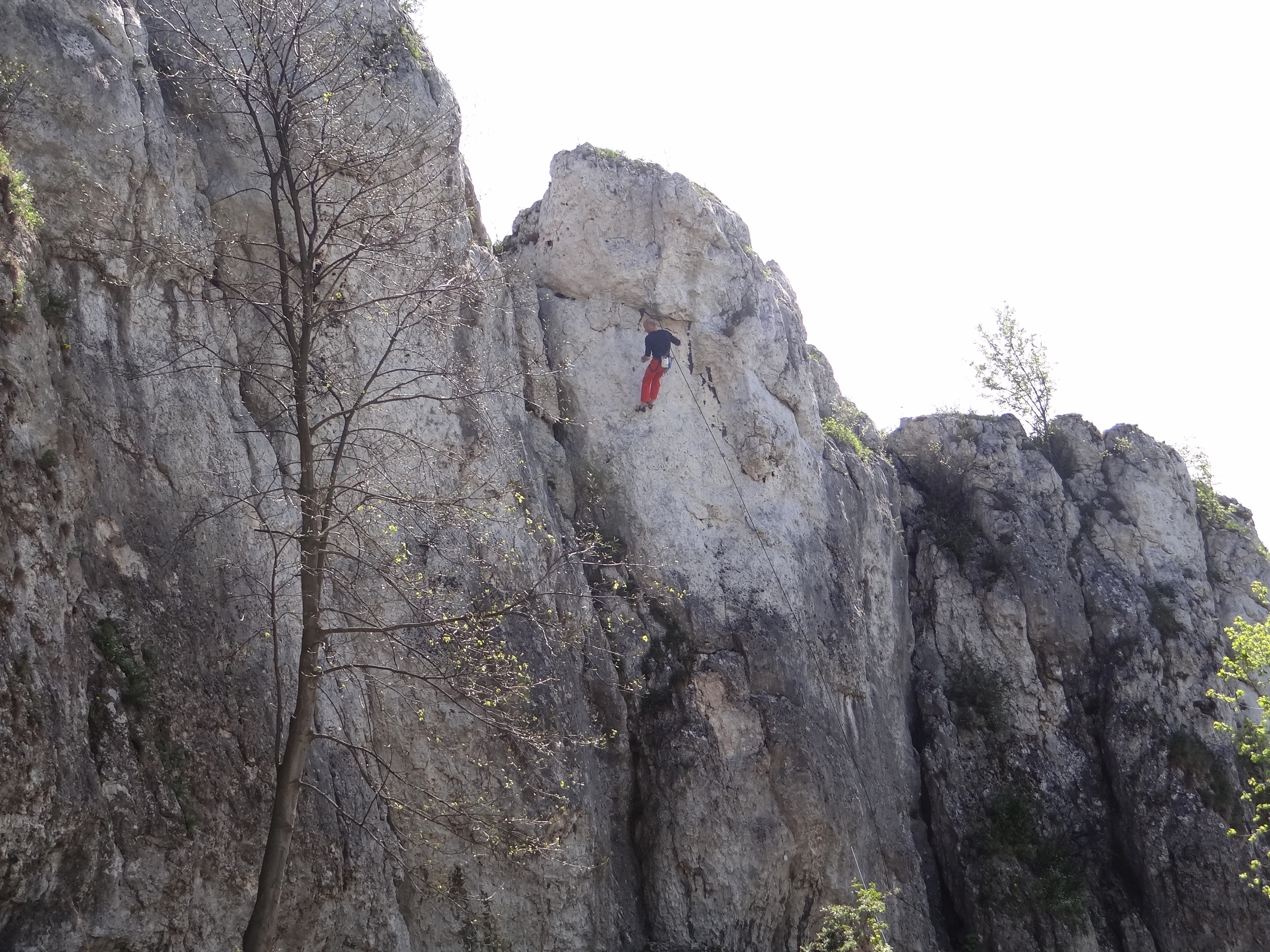 Grodzisko (Wzgórze 502). Ściana Wielkiego Muru